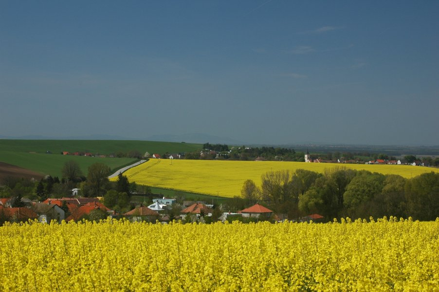 Chvojnica Hills (Chvojnická pahorkatina) near Letničie and Petrova Ves